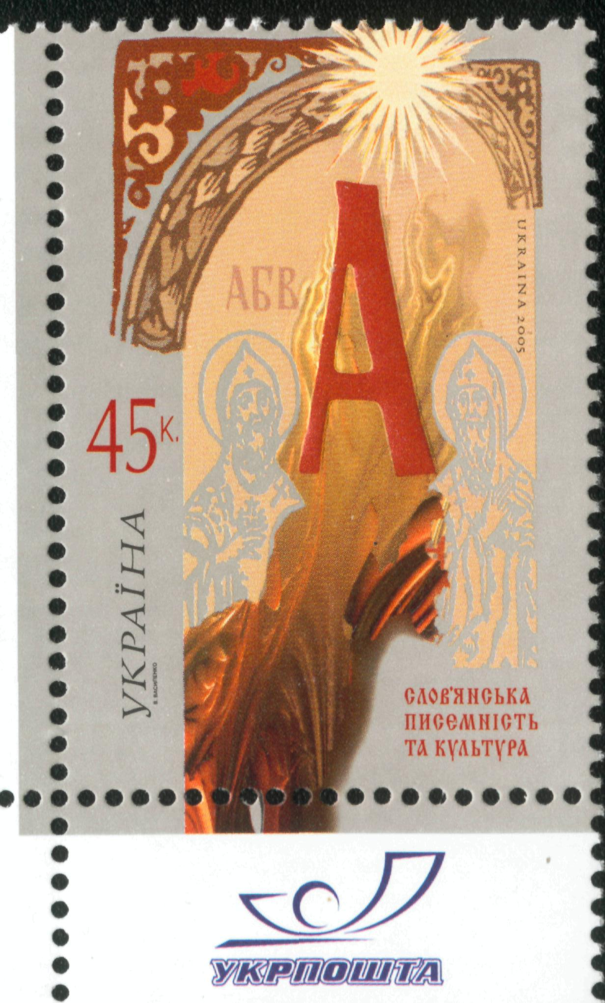 Марка Украины 2005 в честь славянской письменности Кирилла и Мефодия